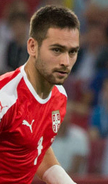 Сборная Бразилии оставляет Сербию за бортом ЧМ-2018 и выходит в плей-офф